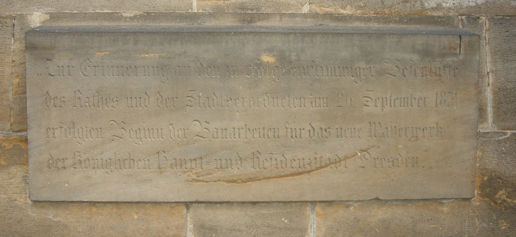 Gedenktafel zum Baubeginn am Wasserwerk Saloppe in Dresden. Text: "Zur Erinnerung an den zufolge einstimmiger Beschlüsse des Rathes und der Stadtverordneten am 26. September 1871 erfolgten Beginn der Bauarbeiten für das neue Wasserwerk der Königlichen Haupt- und Residenzstadt Dresden"